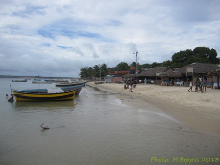 Ramena, Diana Plage et bateaux des pecheurs